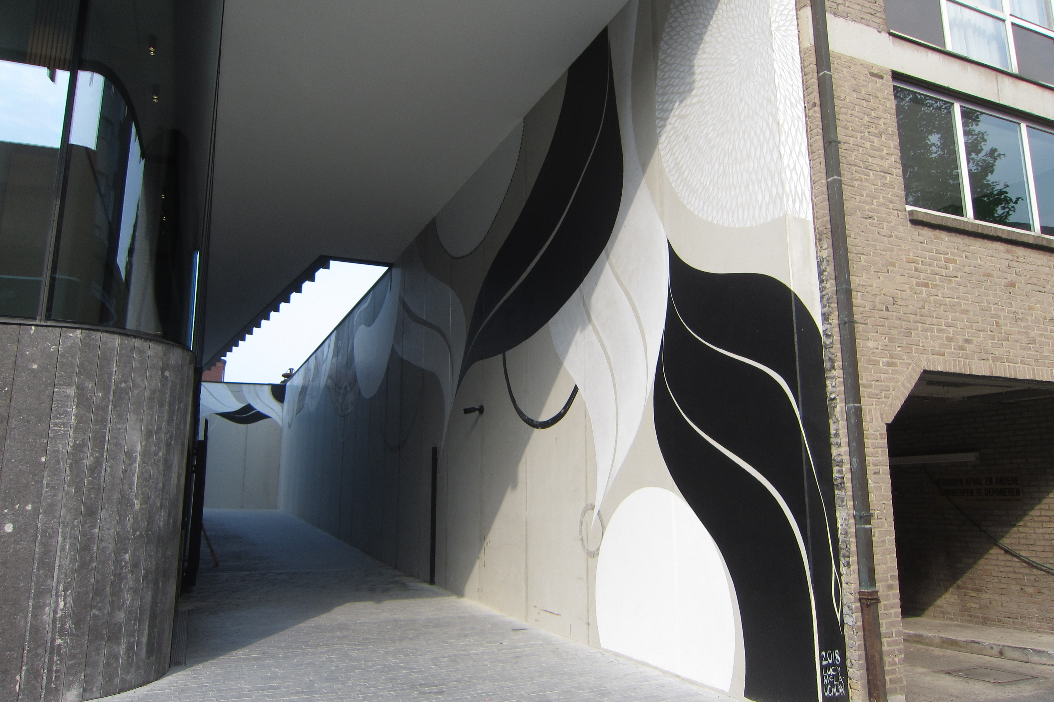 Wandschildering van Lucy MacLaughlan aan het stadskantoor 't Scheep te Hasselt, België